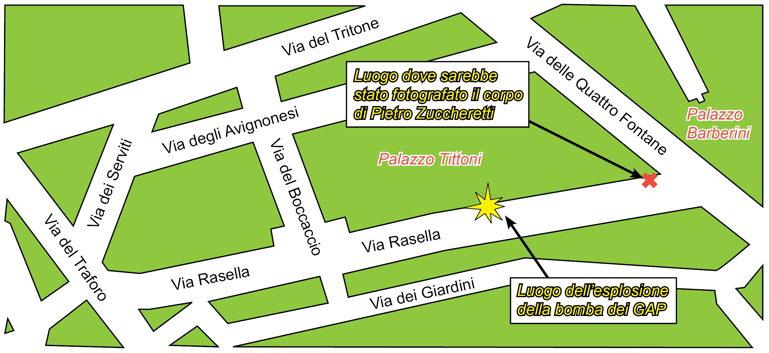 Cartina della zona di Via Rasella in Roma con l'indicazione del luogo dove avvenne l'esplosione della bomba dei GAP e del luogo dove vennero ritrovati e fotografati i resti di Piero Zuccheretti.